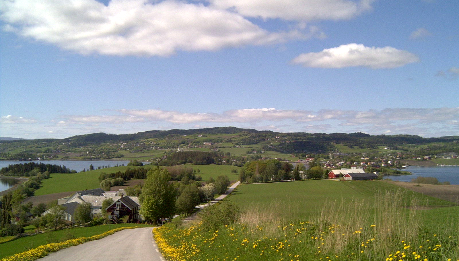 Inderøy sett mot kirka og Straumen. Sund folkehøgskole i forgrunnen.